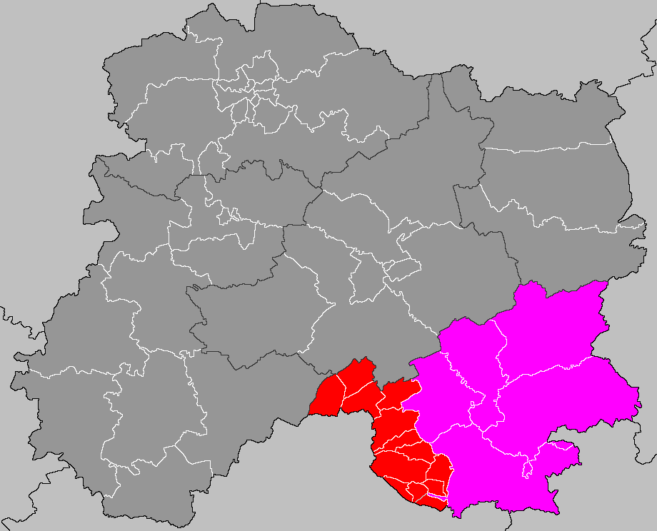 Localisation du canton de Sompuis